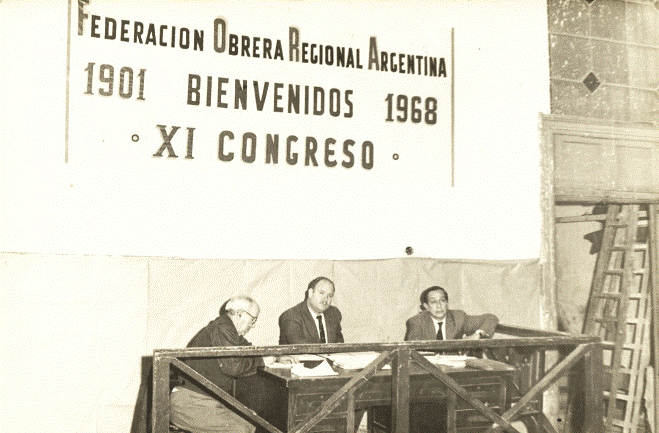 Federacion Obrera Regional Argentina: foto del congreso